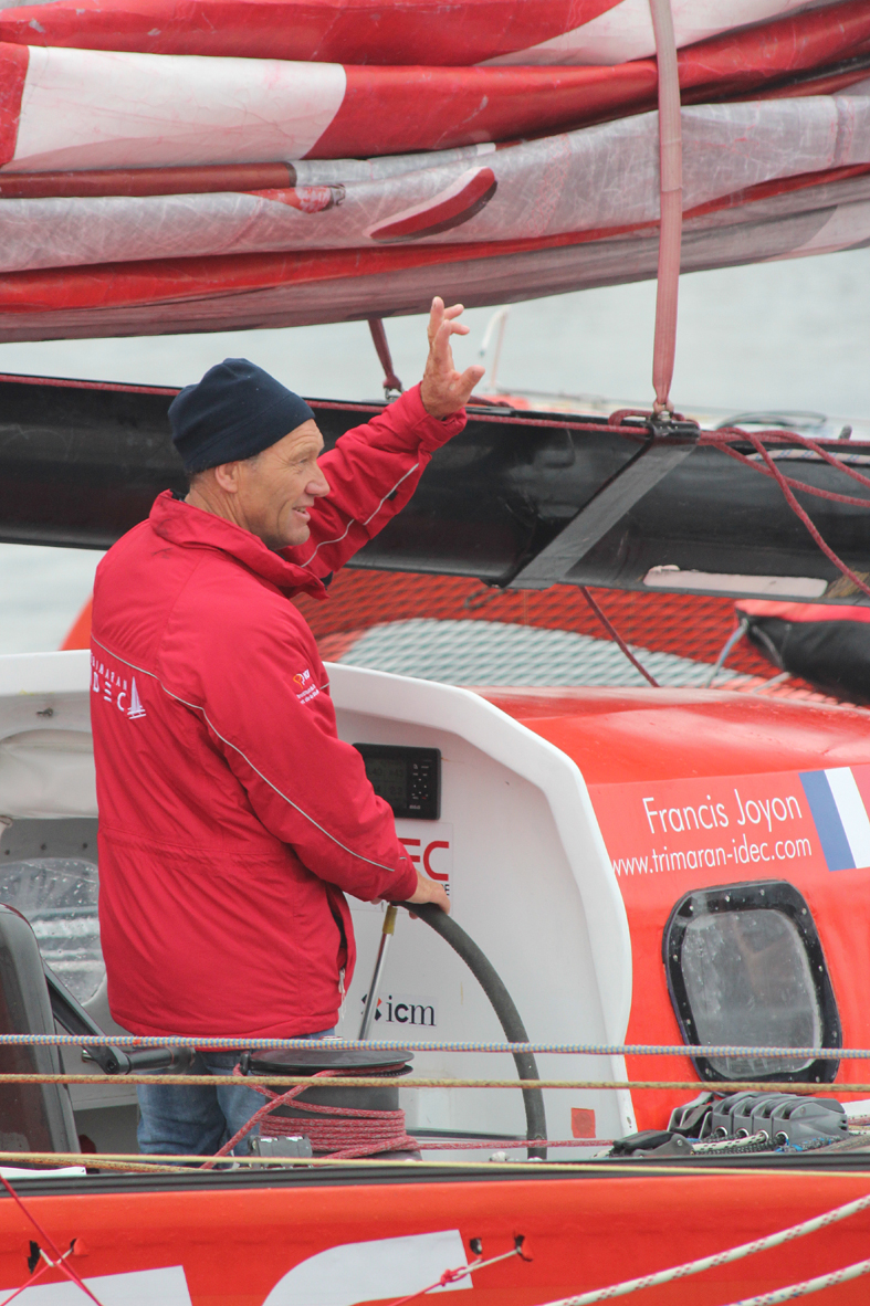 arrivée de Francis Joyon au port du Château de Brest le 17 juin.